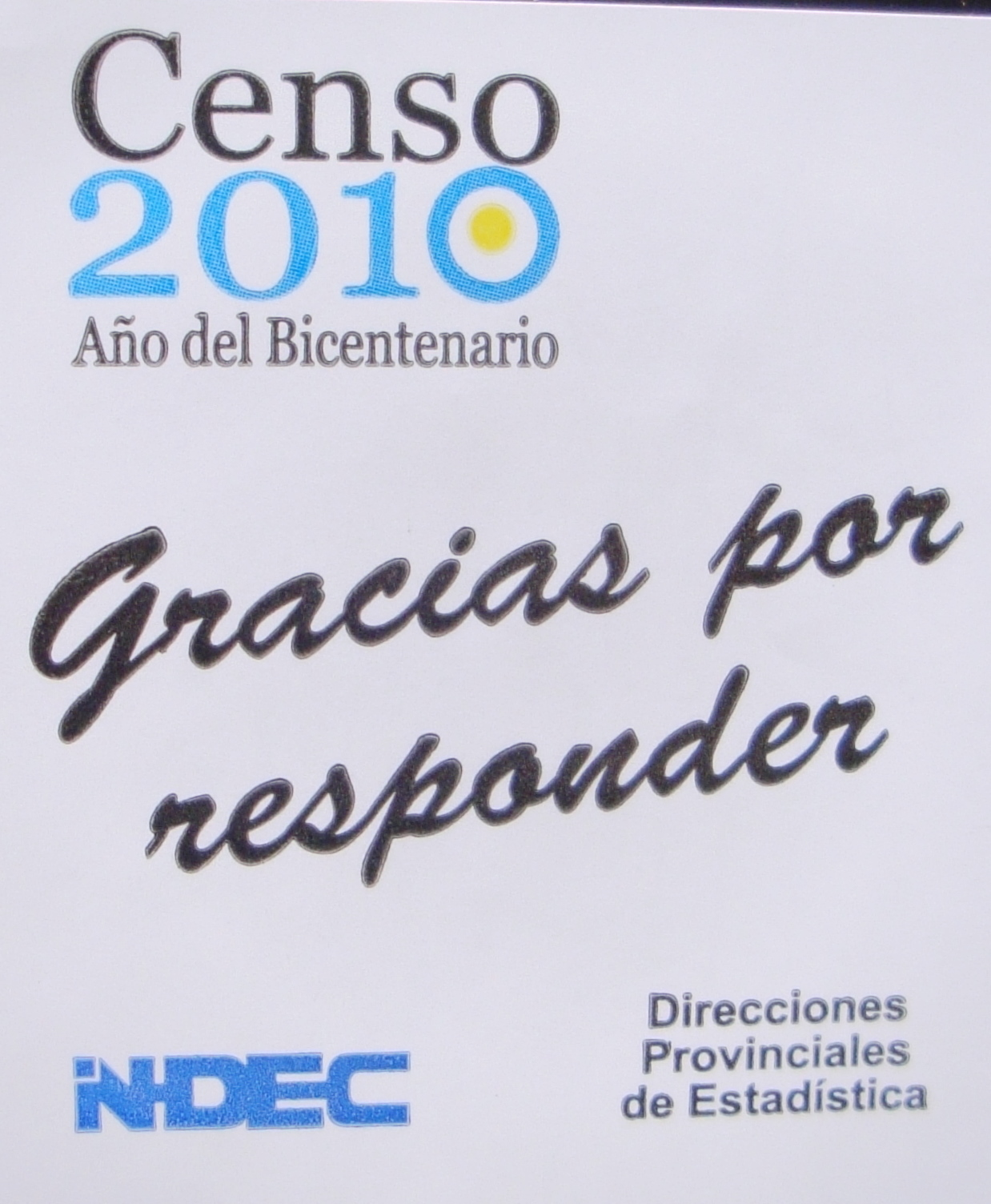 Etiqueta utilizada en el Censo Nacional de Población, Hogares y Viviendas de Argentina, realizado el 27 de octubre de 2010.